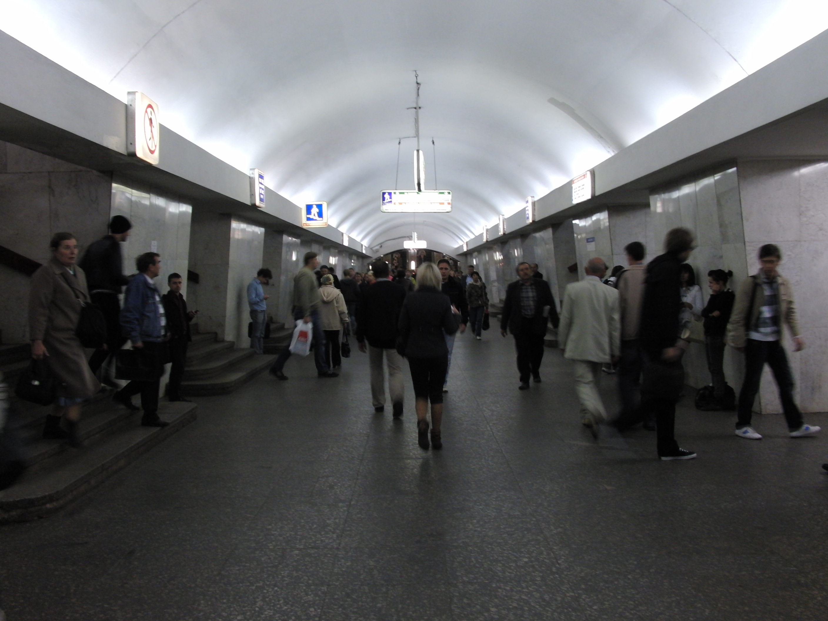 Tretyakovskaya (Третьяковская)